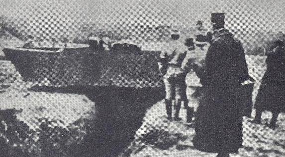 17 mars 1916, essais de la machine Fouché n°1C à Vincennes.